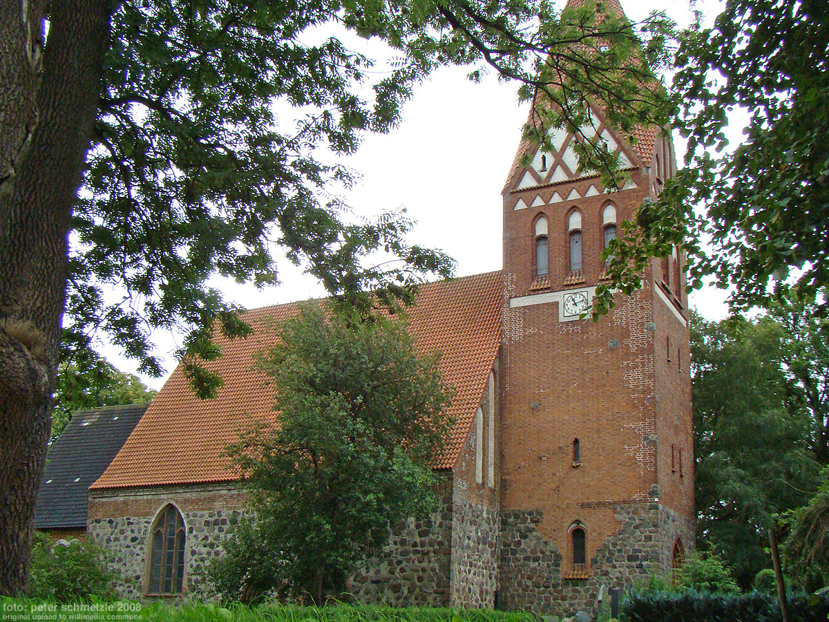 Dorfkirche in Rostock-Biestow